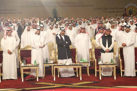 أمير قطر في حفل المزاين